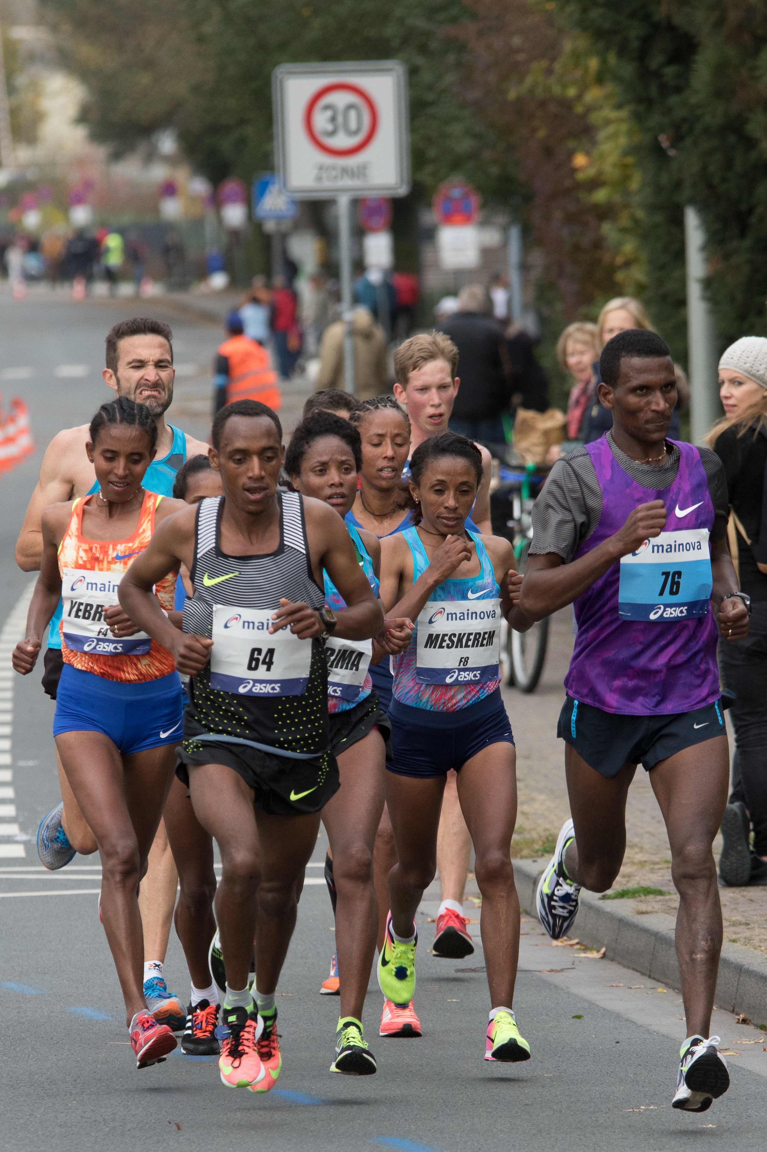 Yebrgual Melese, Kenensa Kedir Roba (64), Merima Mohammed Hasen, Meskerem Assefa Wondimagegn, Mulualem Negese Degefa (76), Frankfurt Marathon 2017